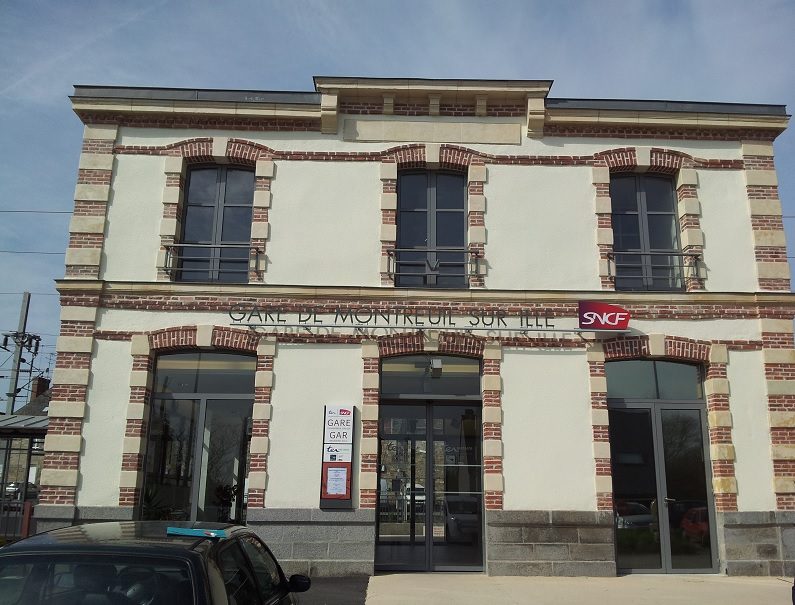 Bâtiment voyageurs après rénovation